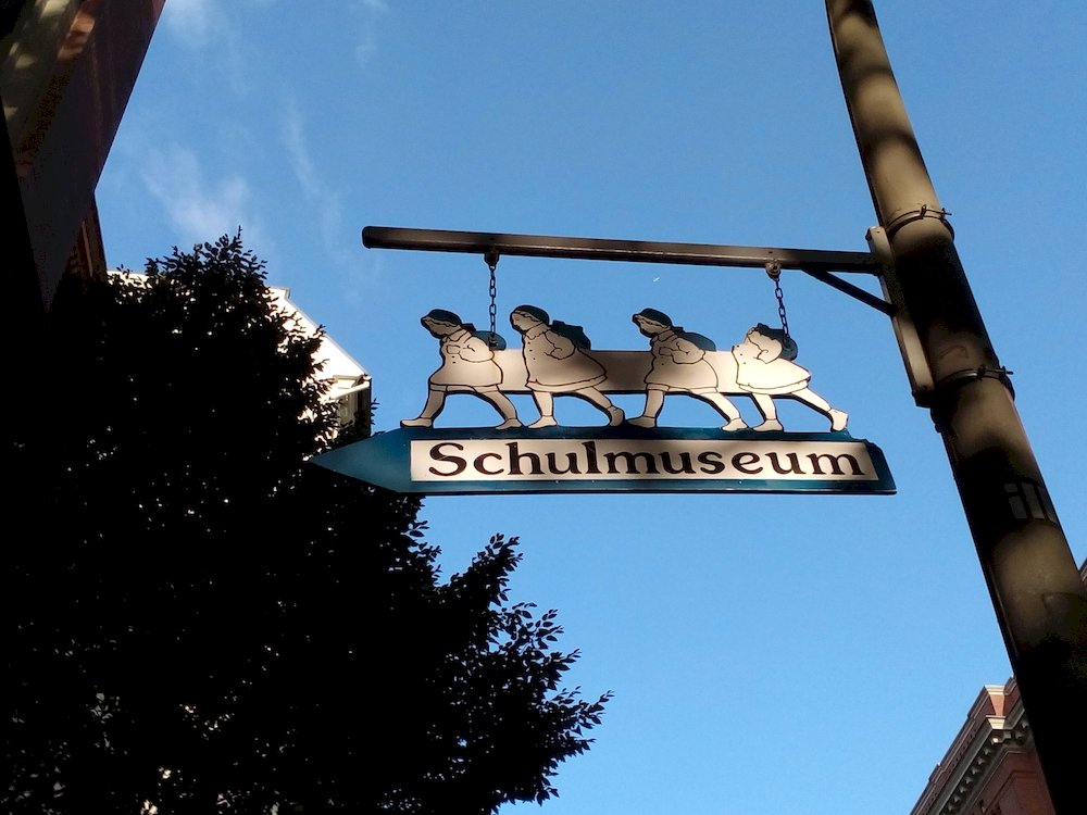 Schild vor dem Schulmuseum Seilerstr Hamburg